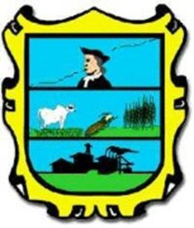 Escudo de Xico.